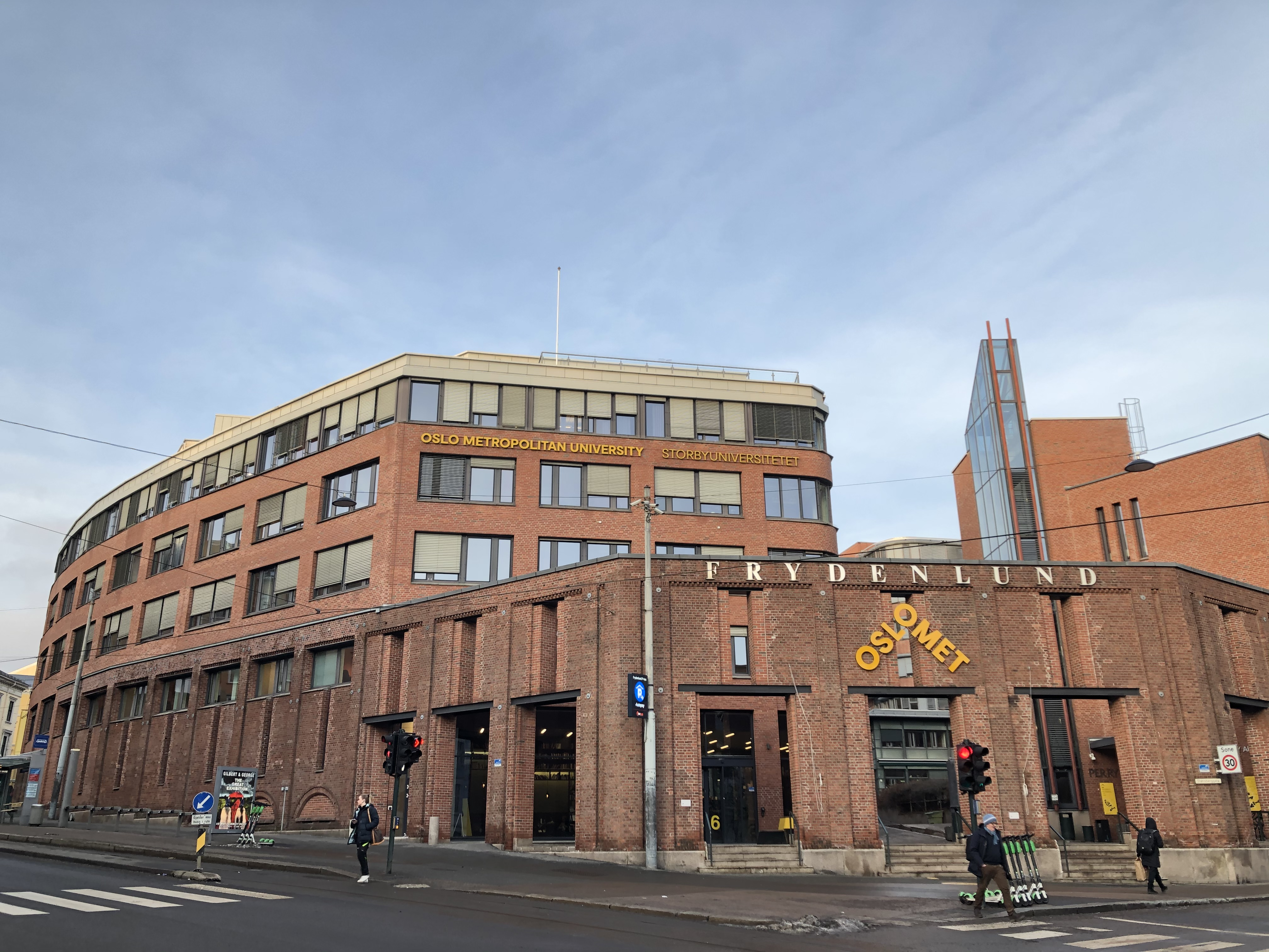 OsloMet, Pilestredet 46-48